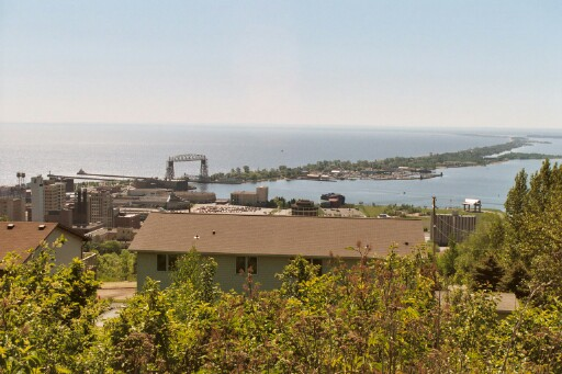 Minnesota Point, Lake Superior, Duluth, Minnesota